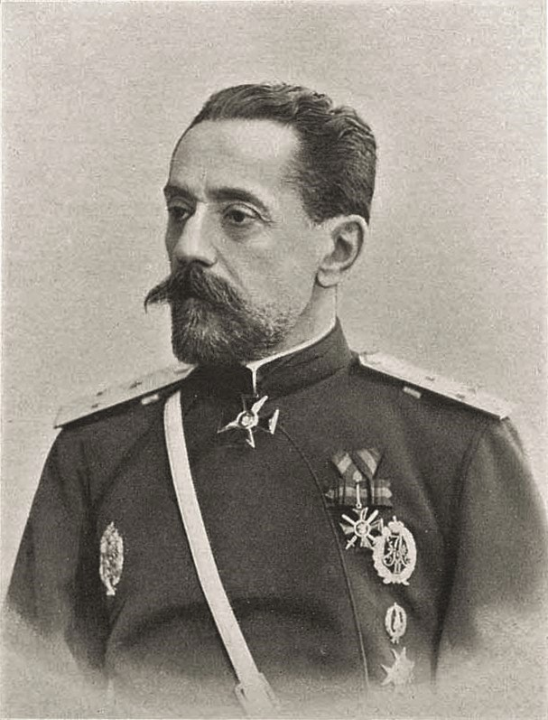 Князь Леонид Дмитриевич Вяземский, член Государственного Совета